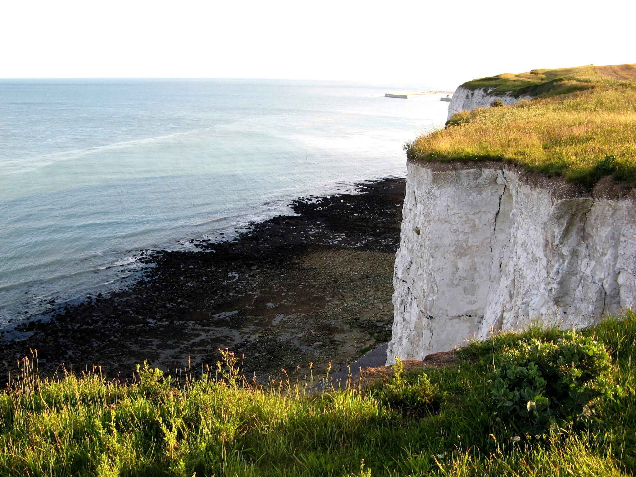 Klippen von Dover